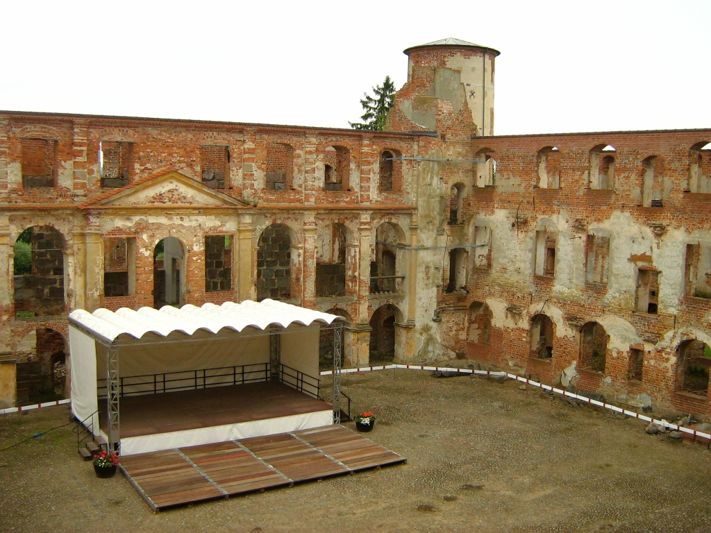 Der Innenhof des Schlosses und Klosters in Dargun (Mecklenburg, Landkreis Nordvommern).